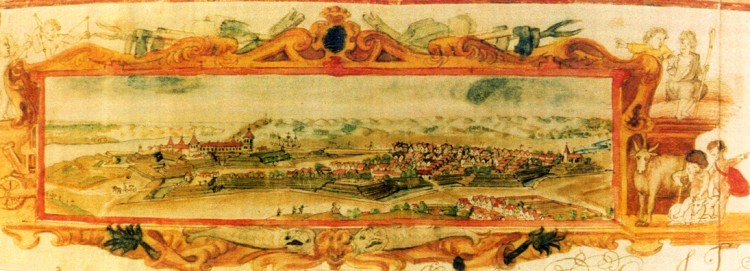 Klaipėda in 1670